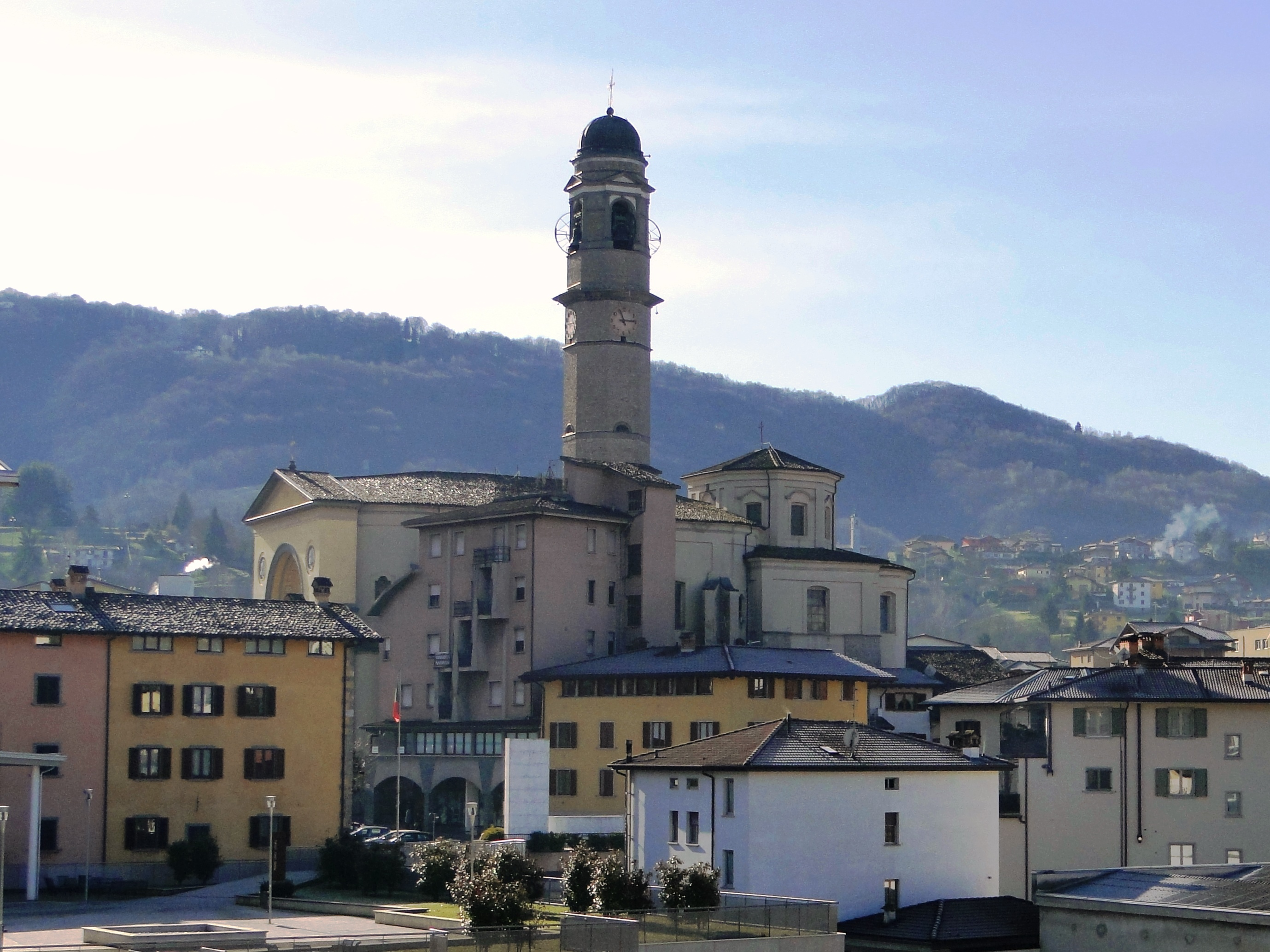 Centro storico di Leffe (BG). Italy